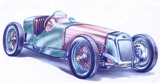 Delage Grand Prix 1927.